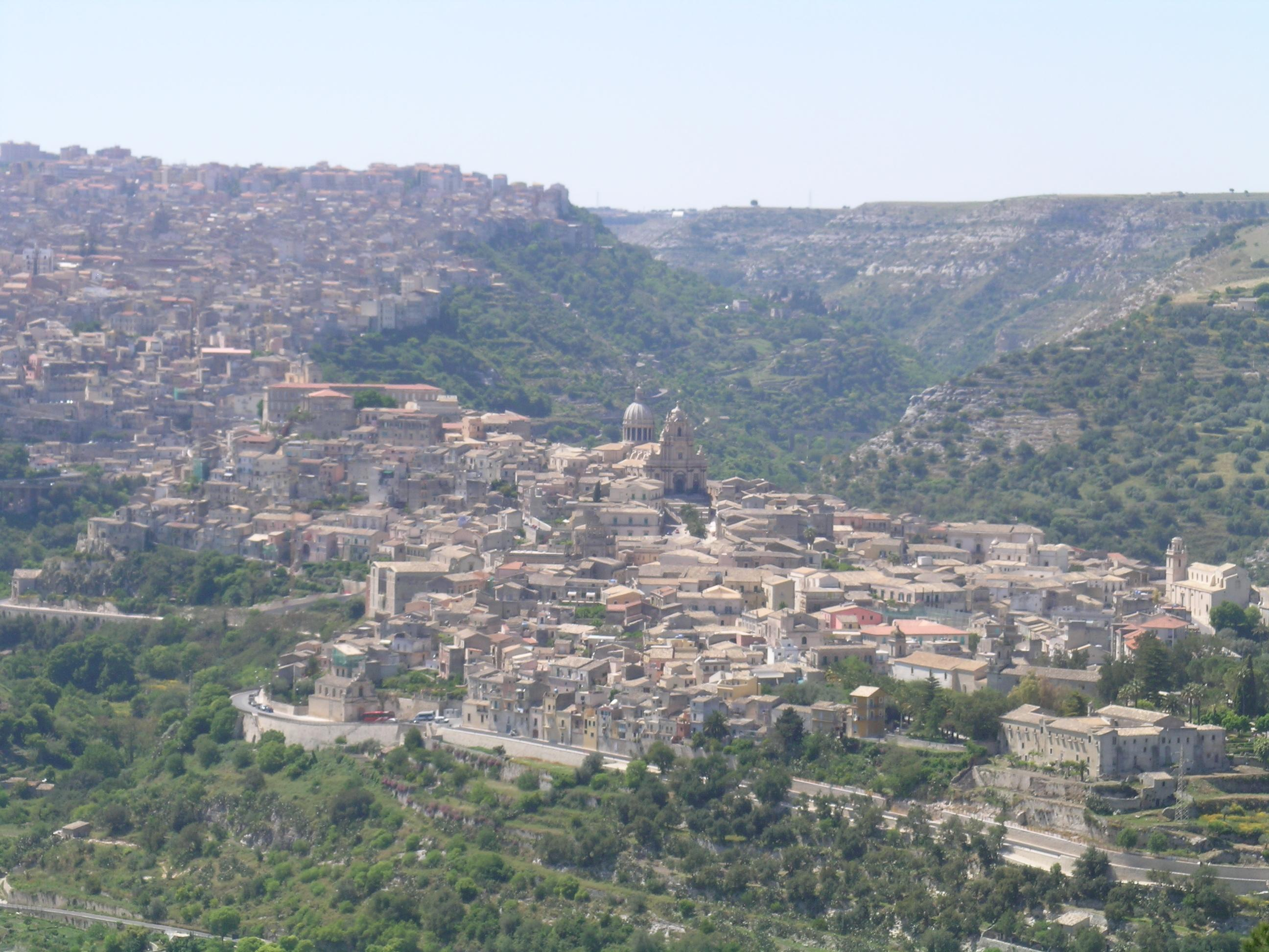 Foto di Ragusa